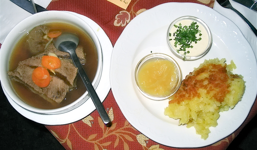 Tafelspitz im Kochsud, mit Apfelkren, Schnittlauchsauce und Kartoffelschmarrn.